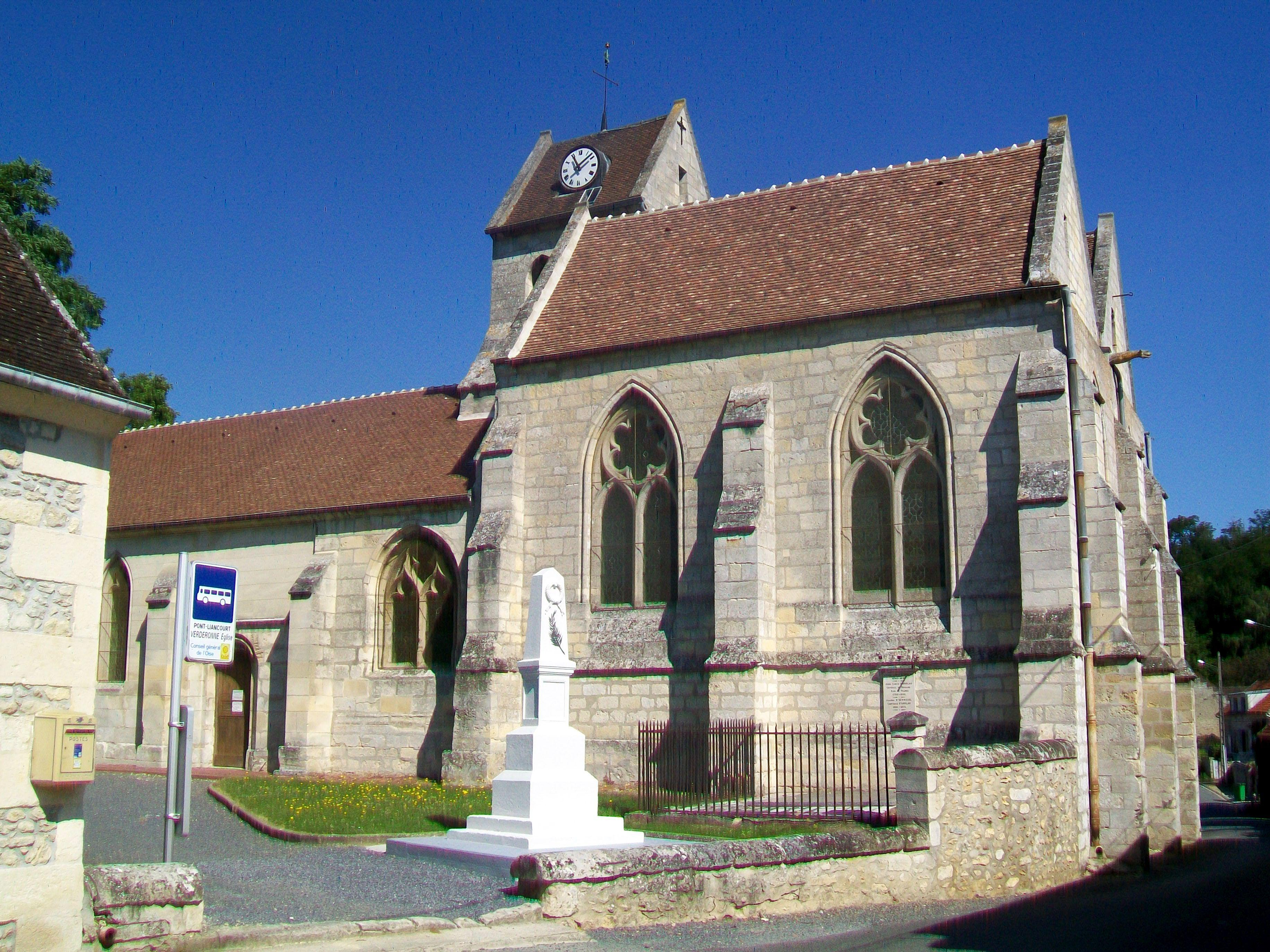 La façade sud.